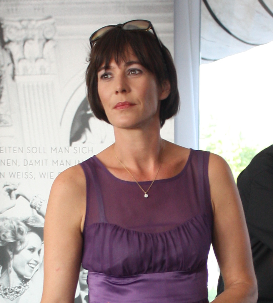 Moderatorin Sandra Maahn in Mannheim